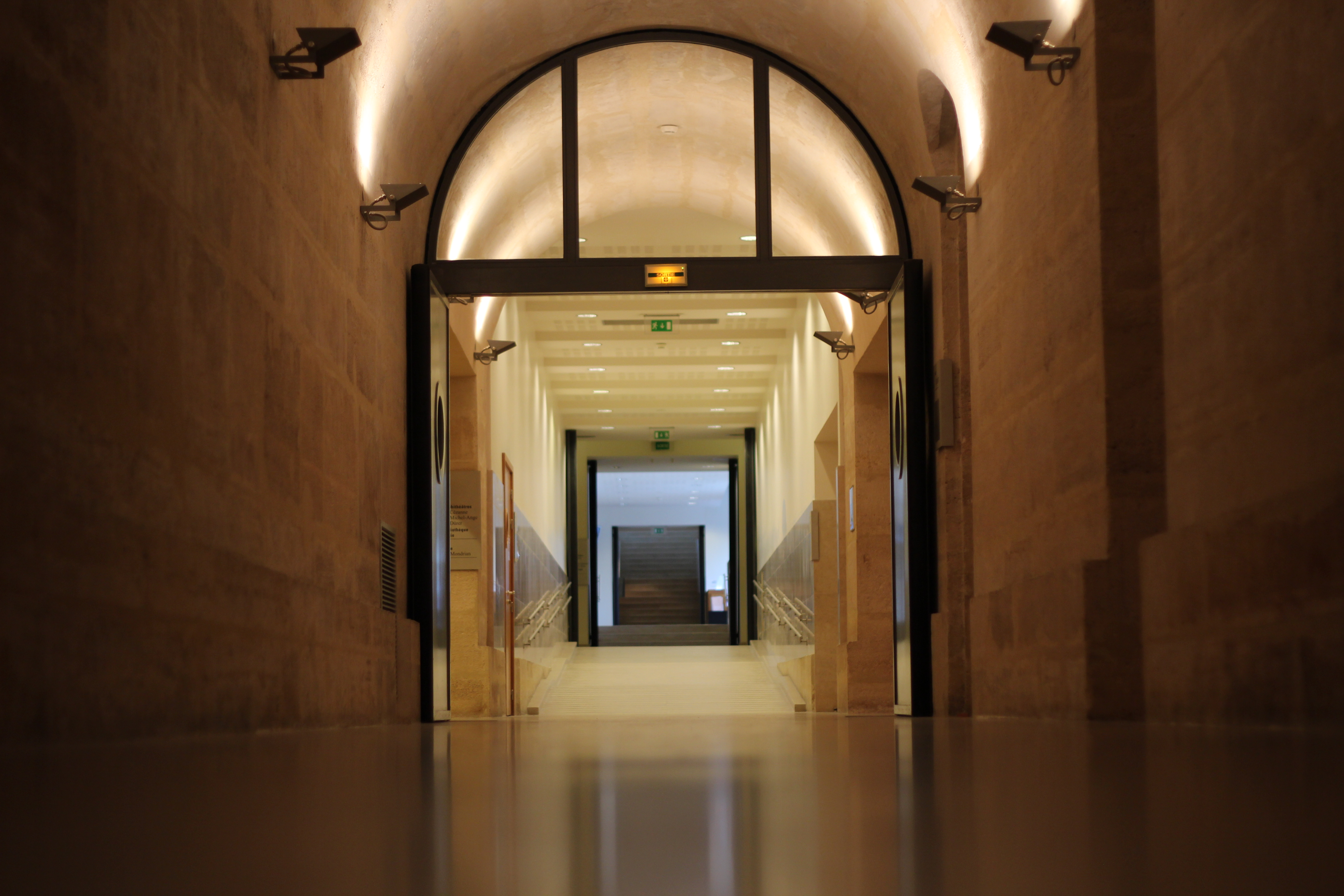 Couloir principale de l’École du Louvre sous l'aile de Flore et le pavillon des États du palais du Louvre.